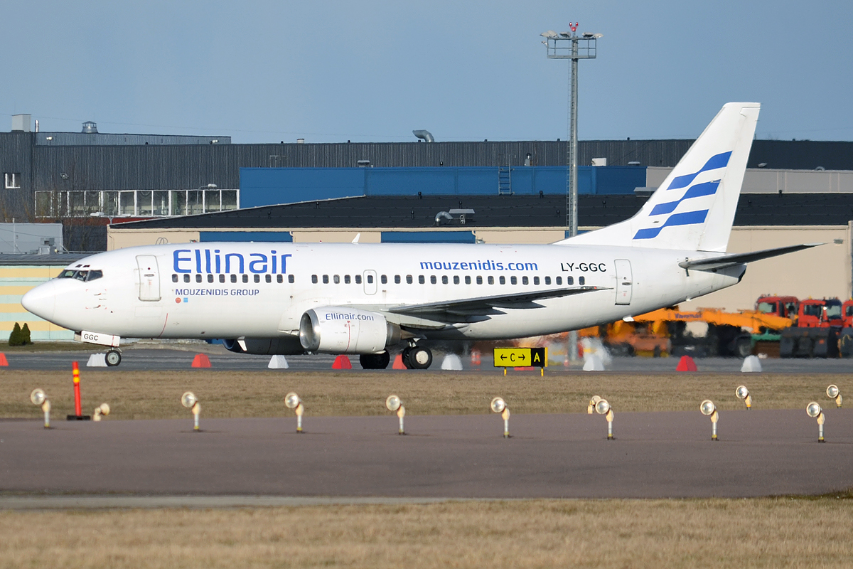 Grand Cru Airlines, LY-GGC, Boeing 737-3Q8